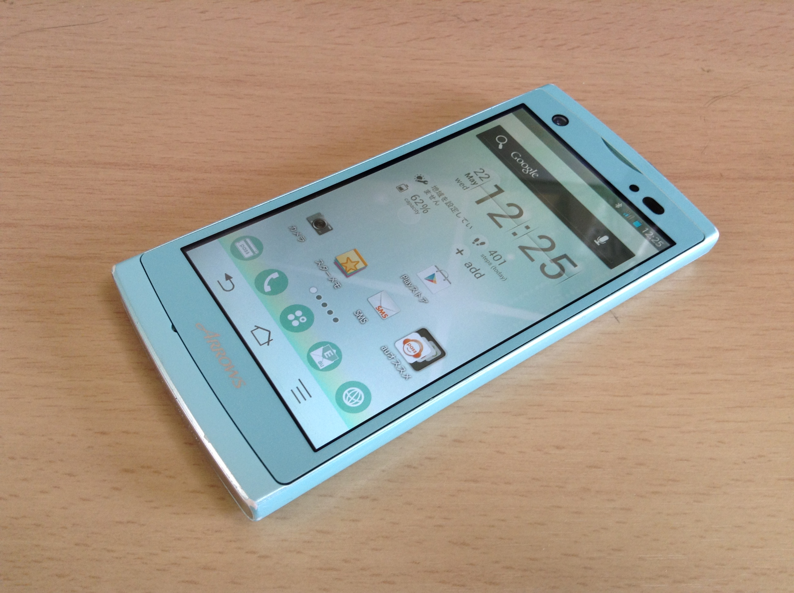 FJL21前面部分 修理代換品です。